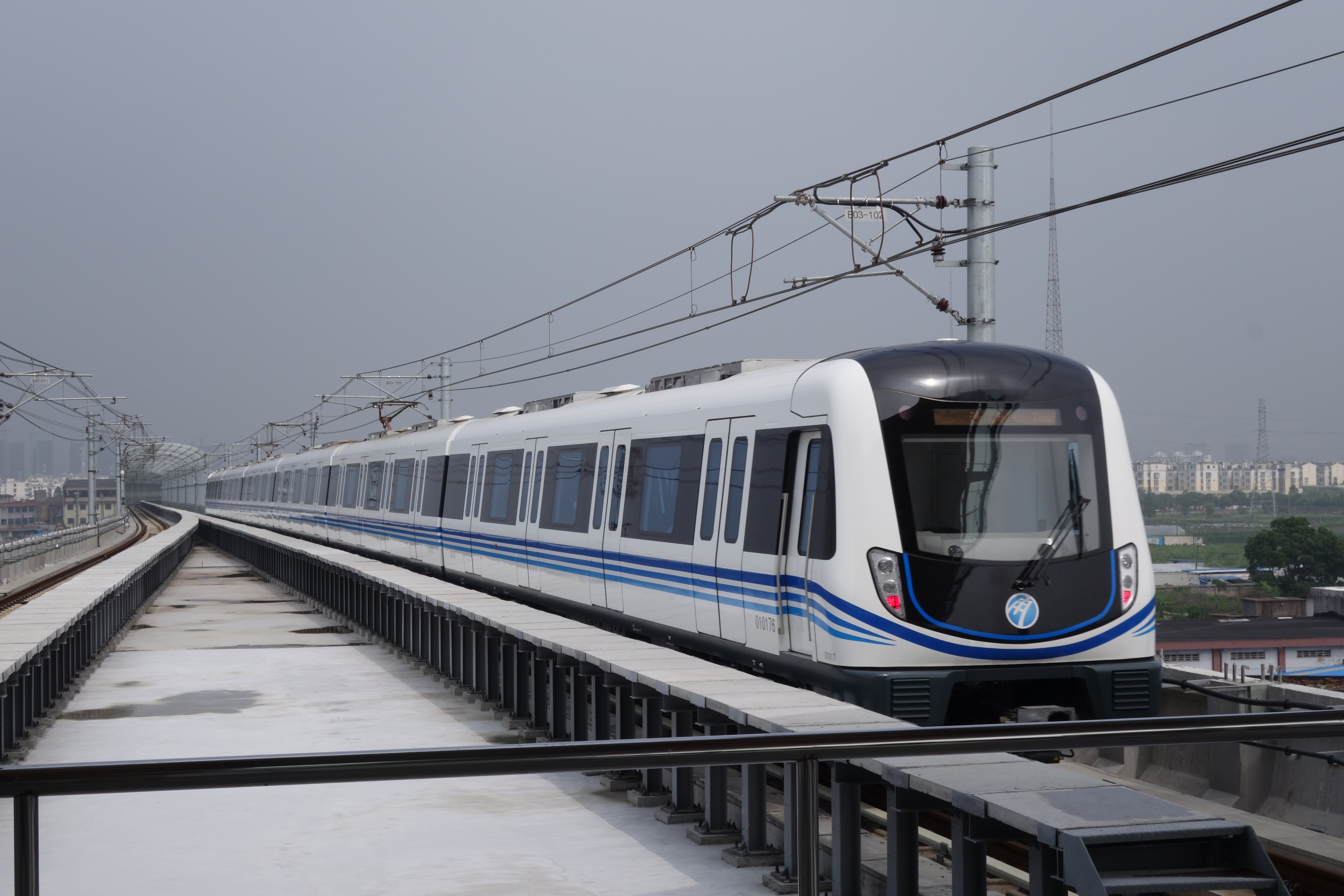 列车离开芦港站